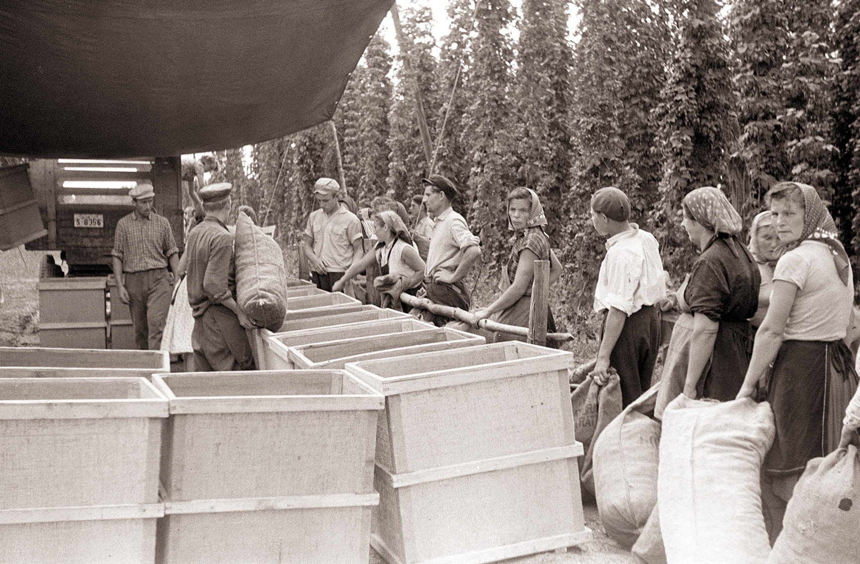 Obiralci na KG Kidričevo v Hajdošah pri merjenju nabranega hmelja.